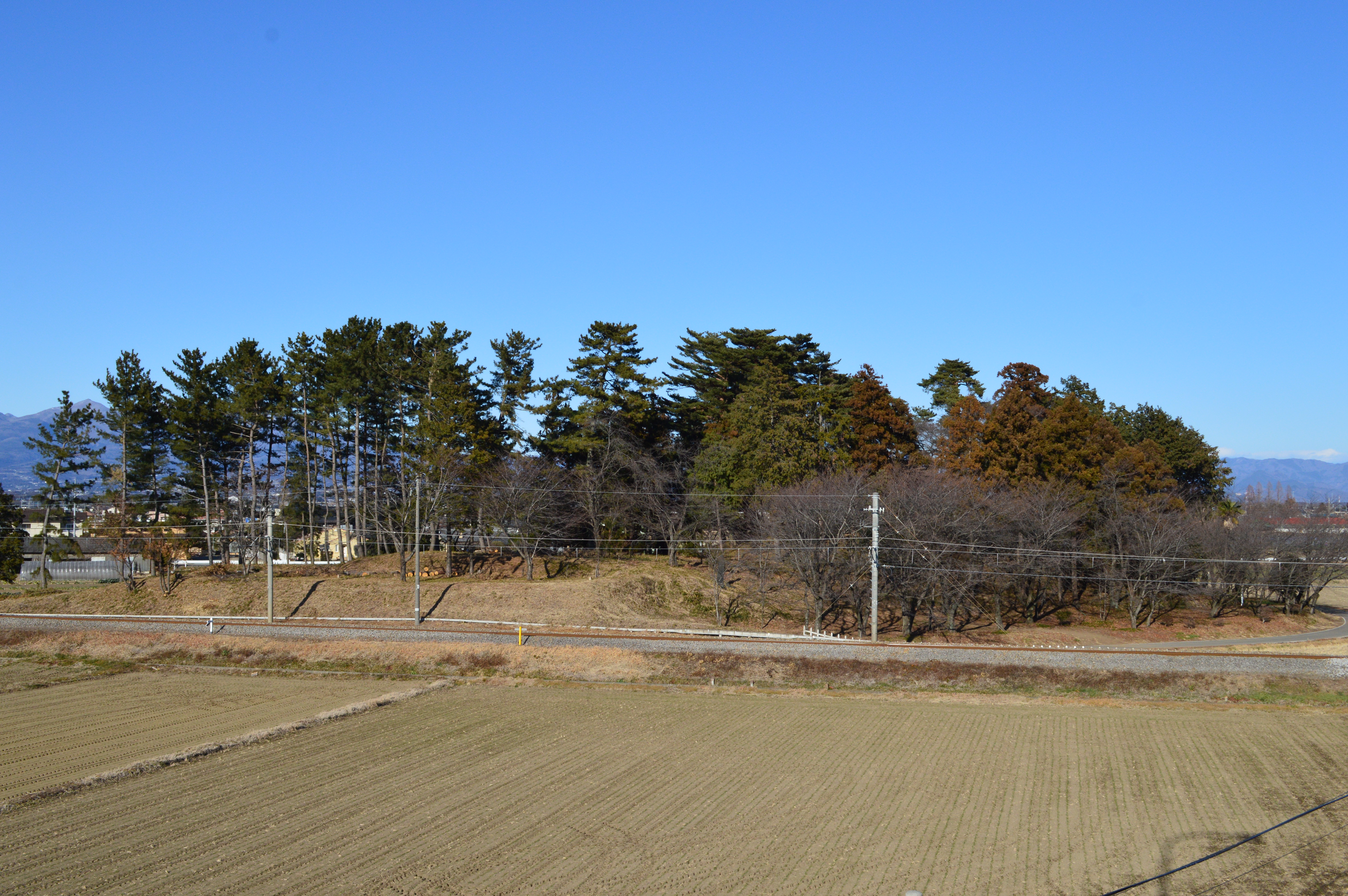 お富士山古墳 全景